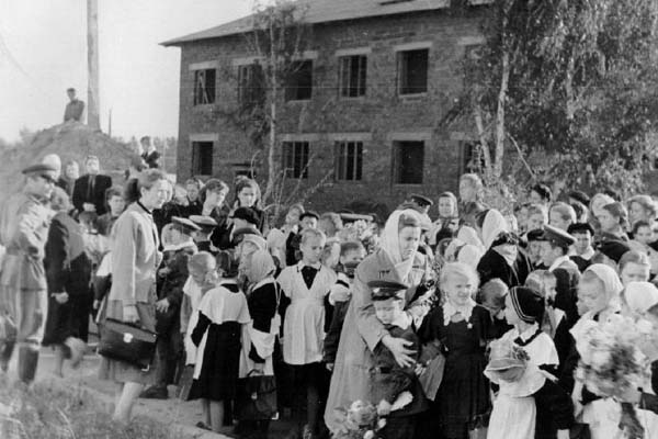 Первая линейка в Школе №130